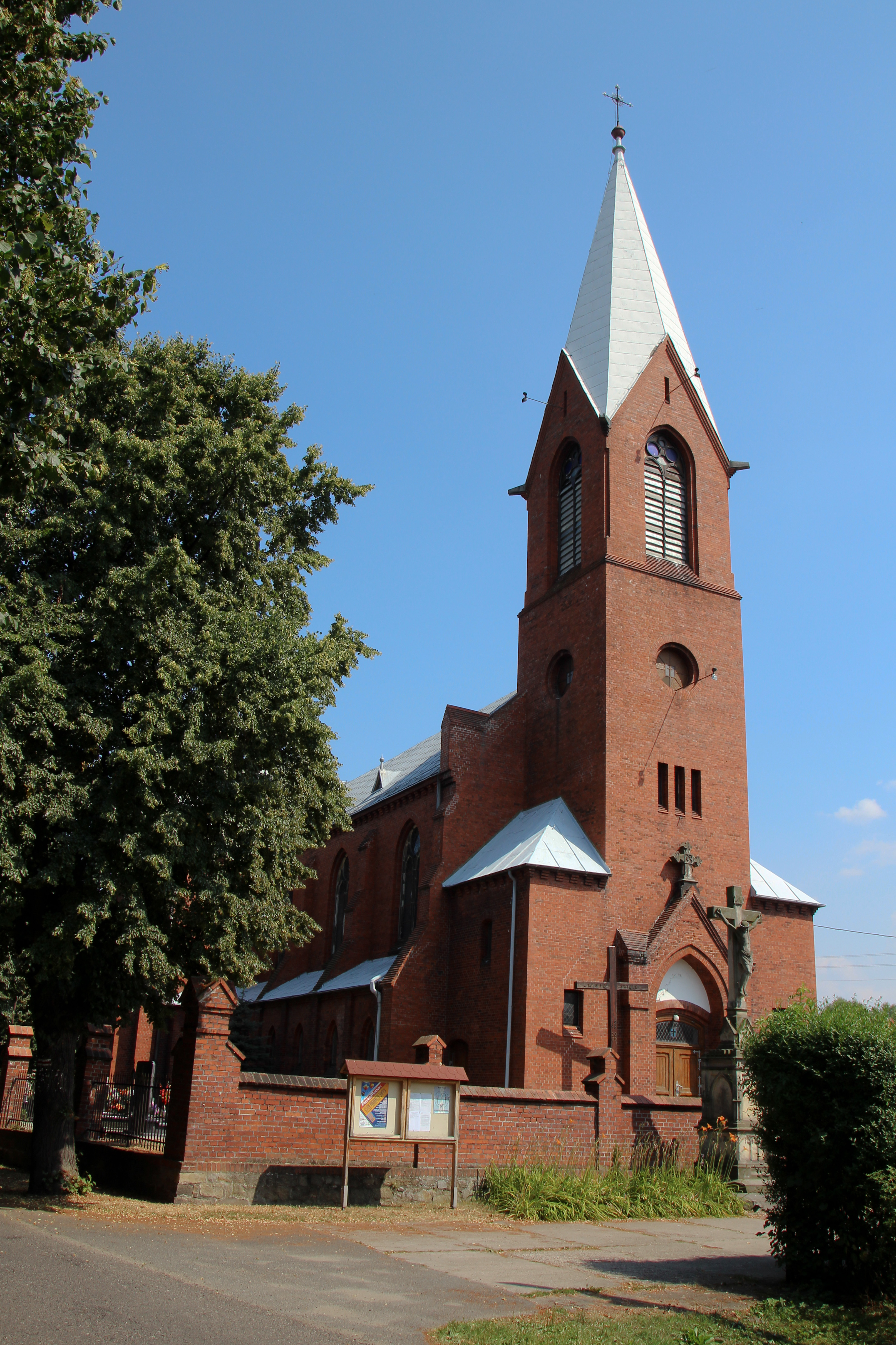 Trzeboszowice – rzymskokatolicki kościół parafialny pw. św. Jadwigi